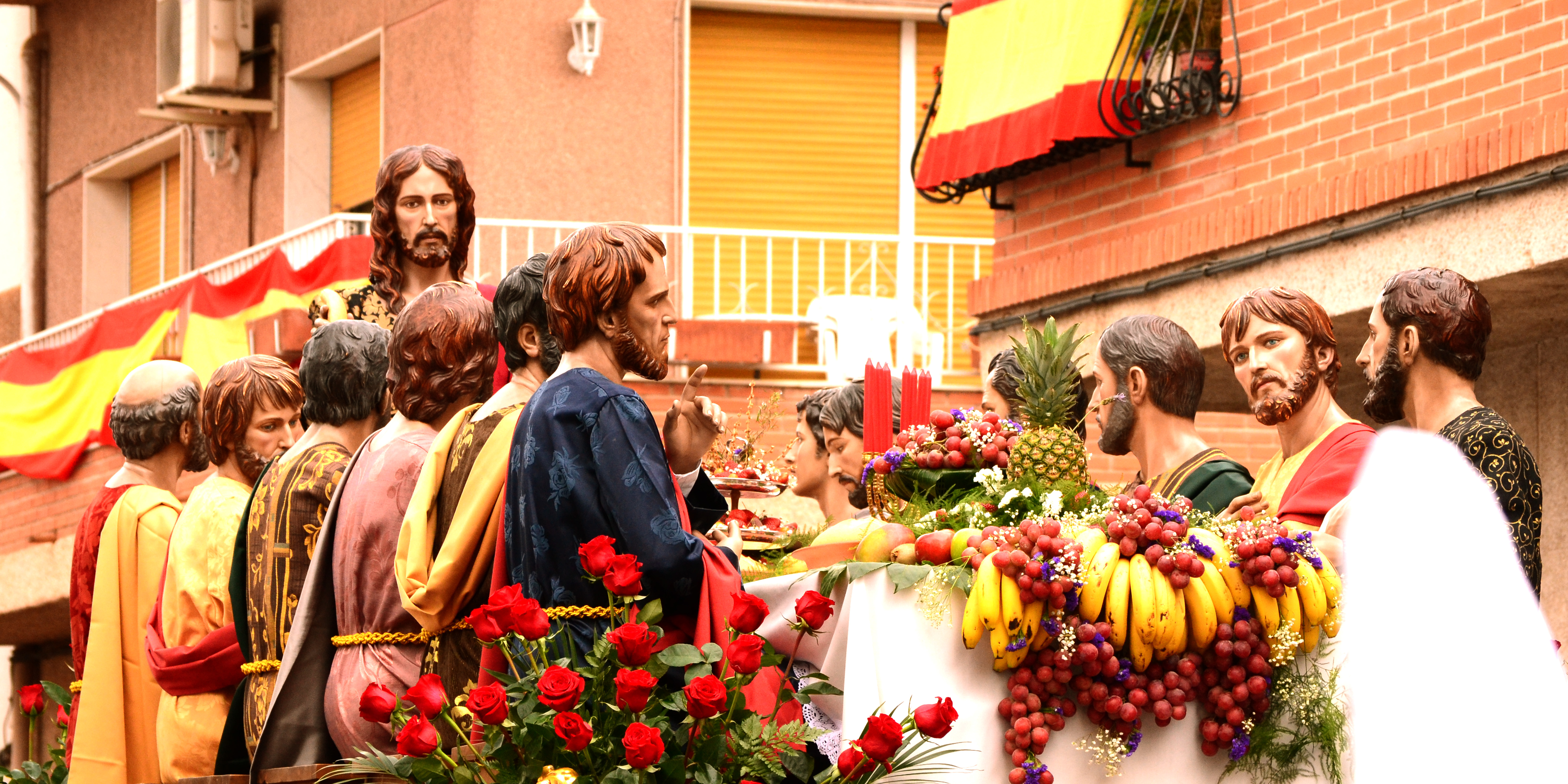 Imagen de la Santa Cena de Archena